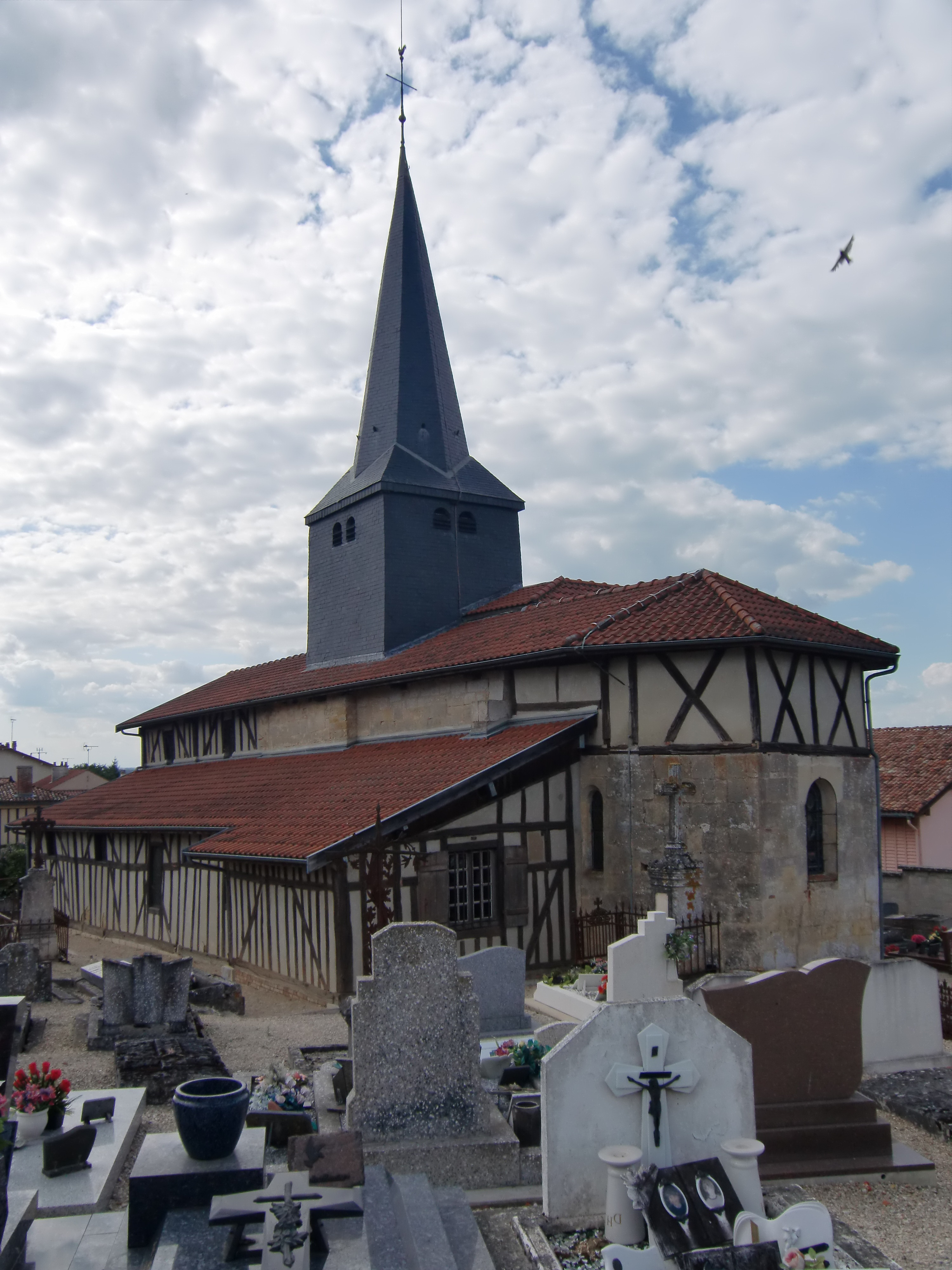 Eglise Saint Maurice d'Arrigny (Marne - Champagne - France) édifice à pans de bois du pays du Der